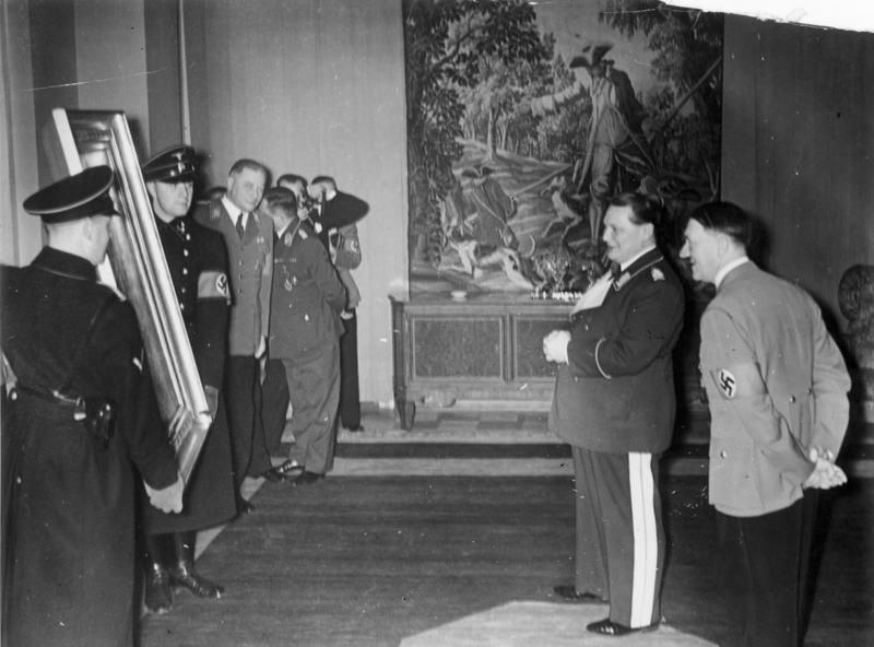 [Scherl-Text]: Der 45. Geburtstag von Ministerpräsident Generaloberst Göring. Um die Mittagsstunde erschien der Führer in der Wohnung des Ministerpräsidenten, sprach ihm seine Glückwünsche aus und überreichte ihm ein wertvolles Gemälde als Geschenk. Fot.: Mü 12.1.1938 [ADN-Text:] Zentralbild:45. Geburtstag Görings. Adolf Hitler überreicht Hermann Göring zum Geburtstag ein Gemälde. Der Hauptkriegsverbrecher Göring wurde vom Internationalen Militärgerichtshof in Nürnberg zum Tode verurteilt.